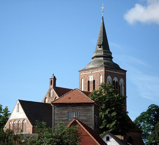 Kirche St. Johannis in Lassan, Ansicht aus der Wendenstraße (Nordost)